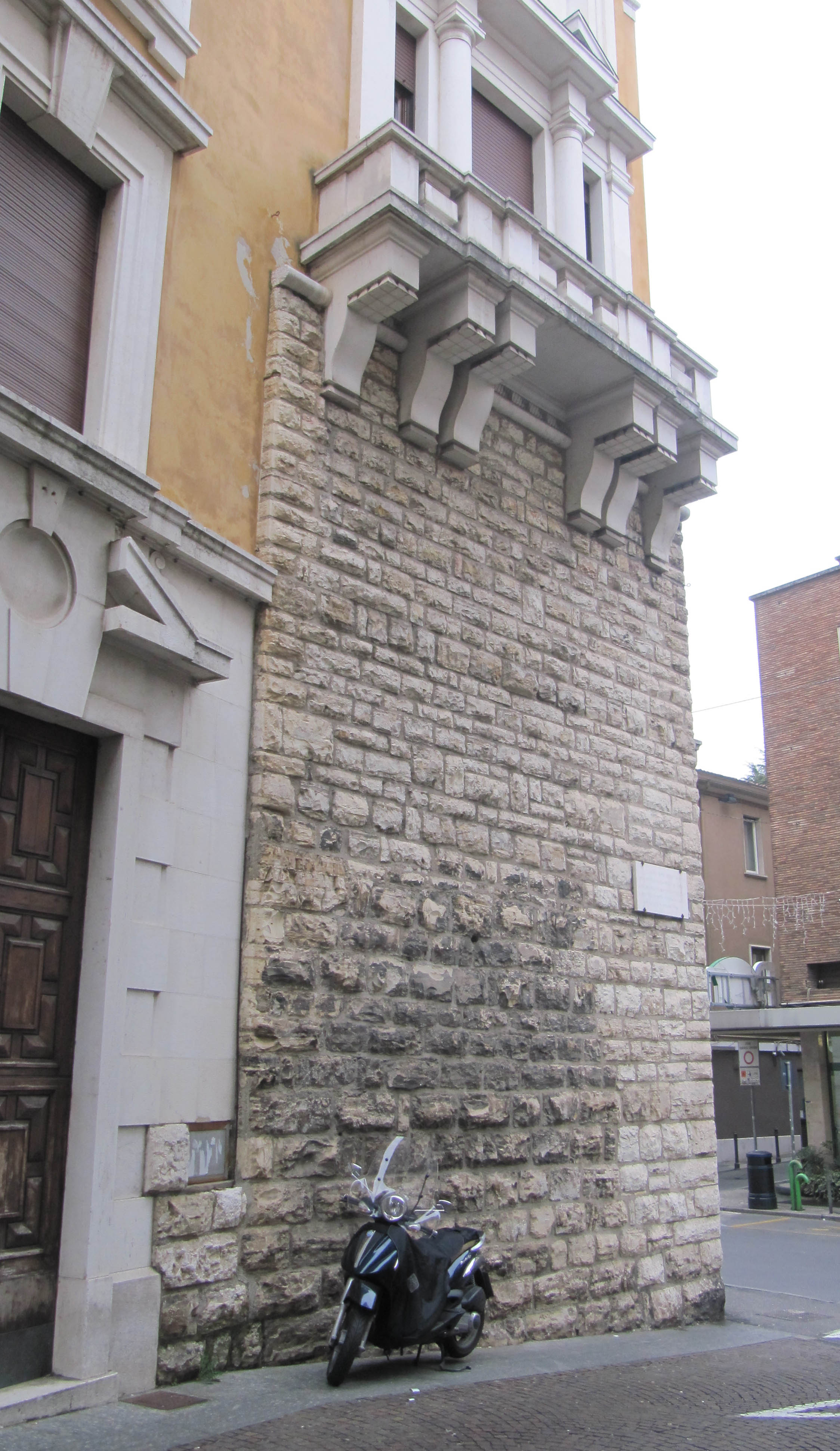 Torre Teofila (Brescia)